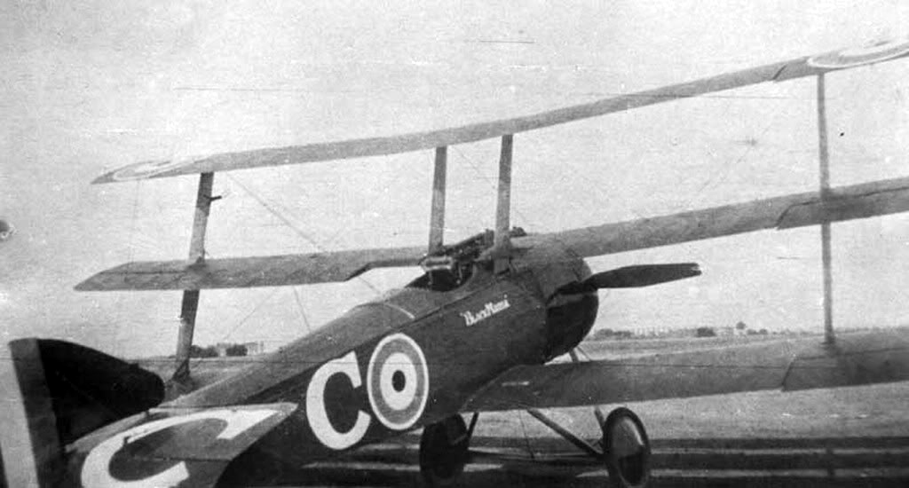 Triplane